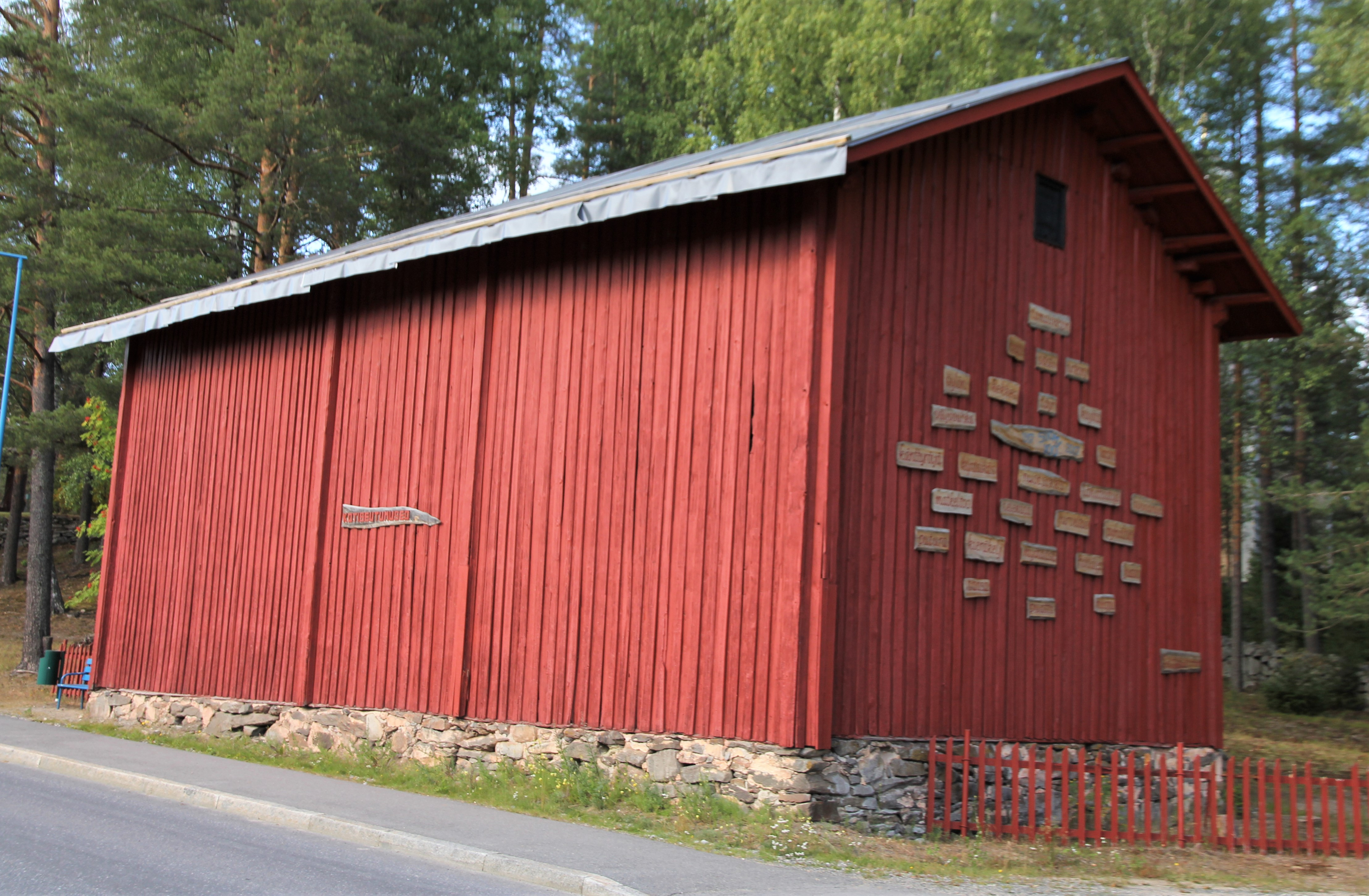 Tuusniemen kotiseutumuseo on pohjoissavolaisen Tuusniemen kunnan kirkonkylällä, Tuusniemen kirkon ja kunnantalon naapurina sijaitseva paikallismuseo. Se toimii oletettavasti vuonna 1860 rakennetussa pitäjänmakasiinissa (vuosiluku lukkolaitteessa). Varkaudet ja muut tuhot yritettiin estää monin keinoin; Tuusniemen makasiinissa tätä kuvastavat kaksinkertaiset hirsiseinät, sisäseinissä ja lattiaraoissa olevat pellitykset ja oven kolme eri avainta vaativa lukko. Jyvähinkalot on poistettu sotien jälkeen. Jo 1950-luvulla makasiiniin kerättiin museoesineitä, mutta virallisesti museo siitä tehtiin vuonna 1964. Kotiseutumuseon osoite on Keskitie 19, Tuusniemi.